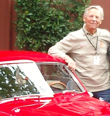 Photo avec CFS